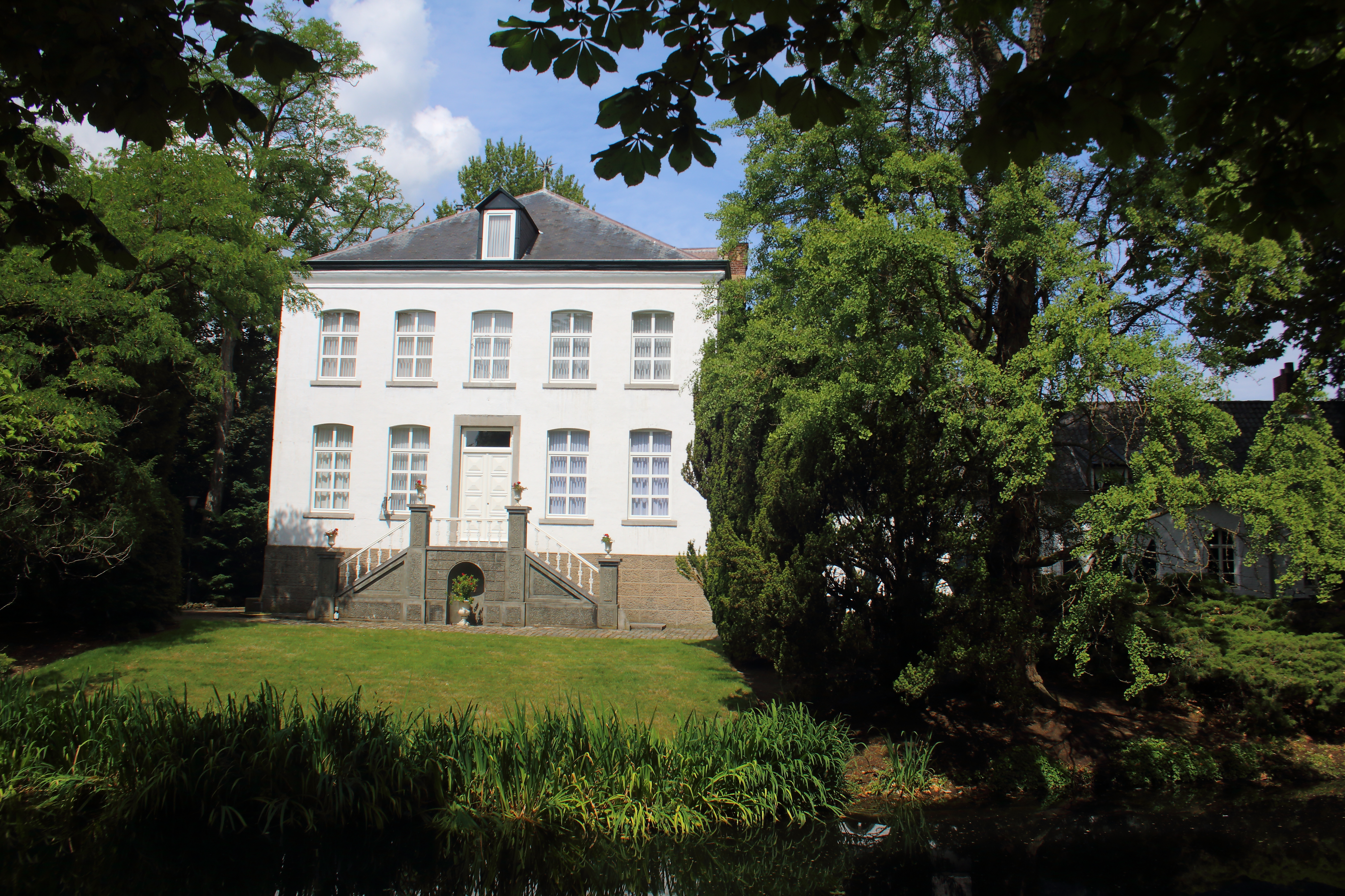 Nijenborgh, Weert, Limburg, Nederland